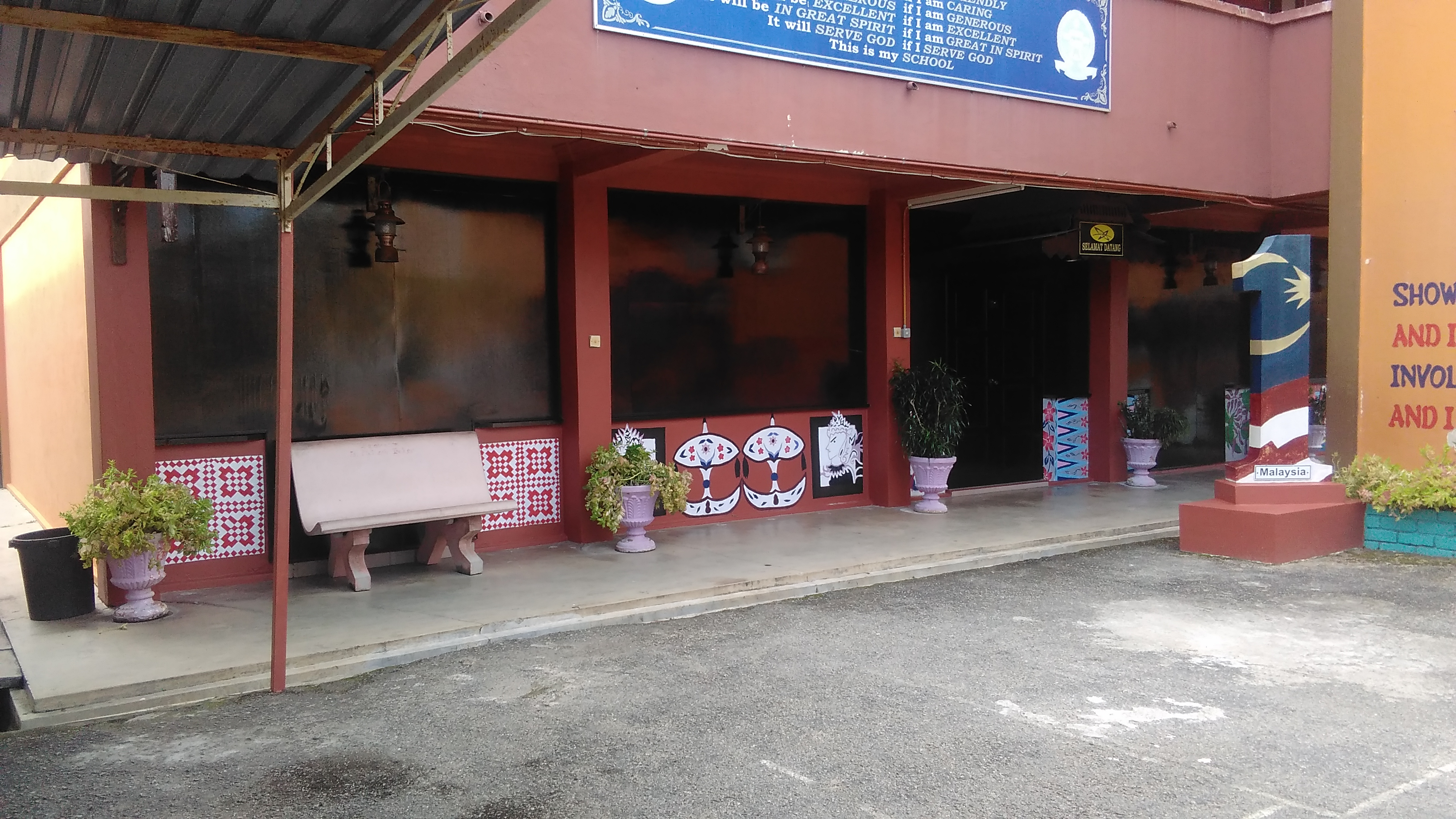 Pandangan Luar 2